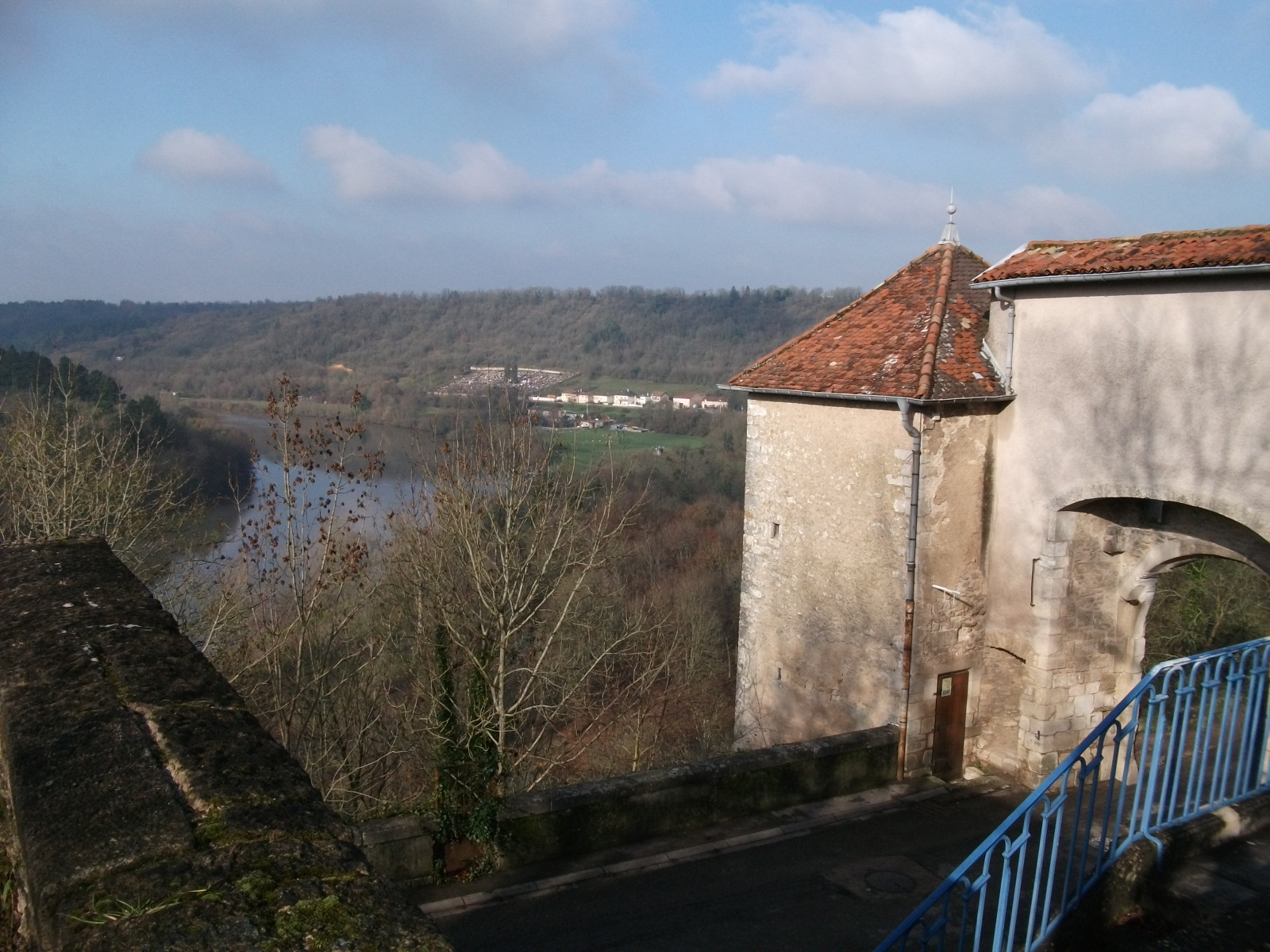 Vue de la porte et la vallée.